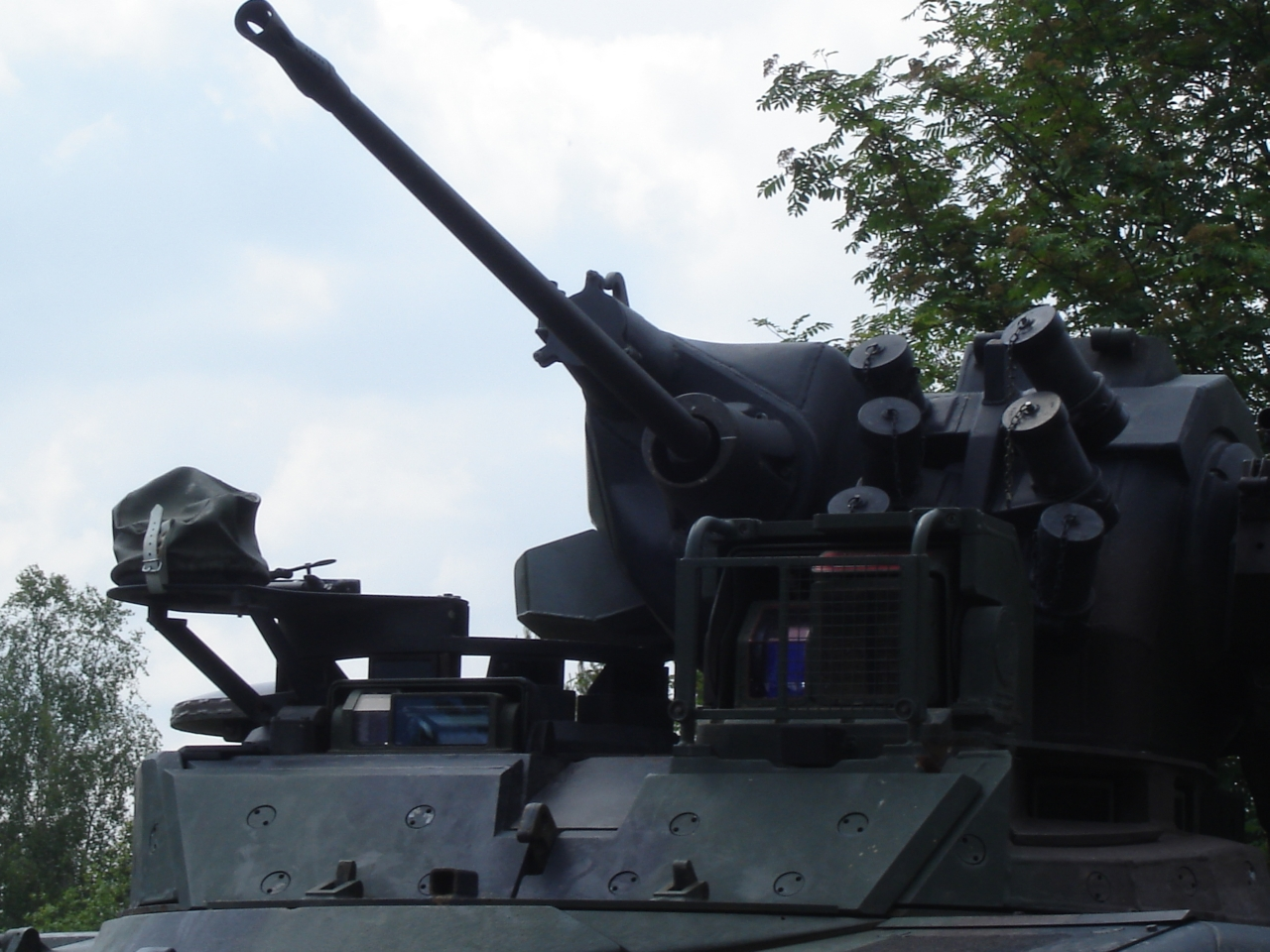 Bordmaschinenkanone MK 20 Rh 202 des Marder 1A3 und Optik